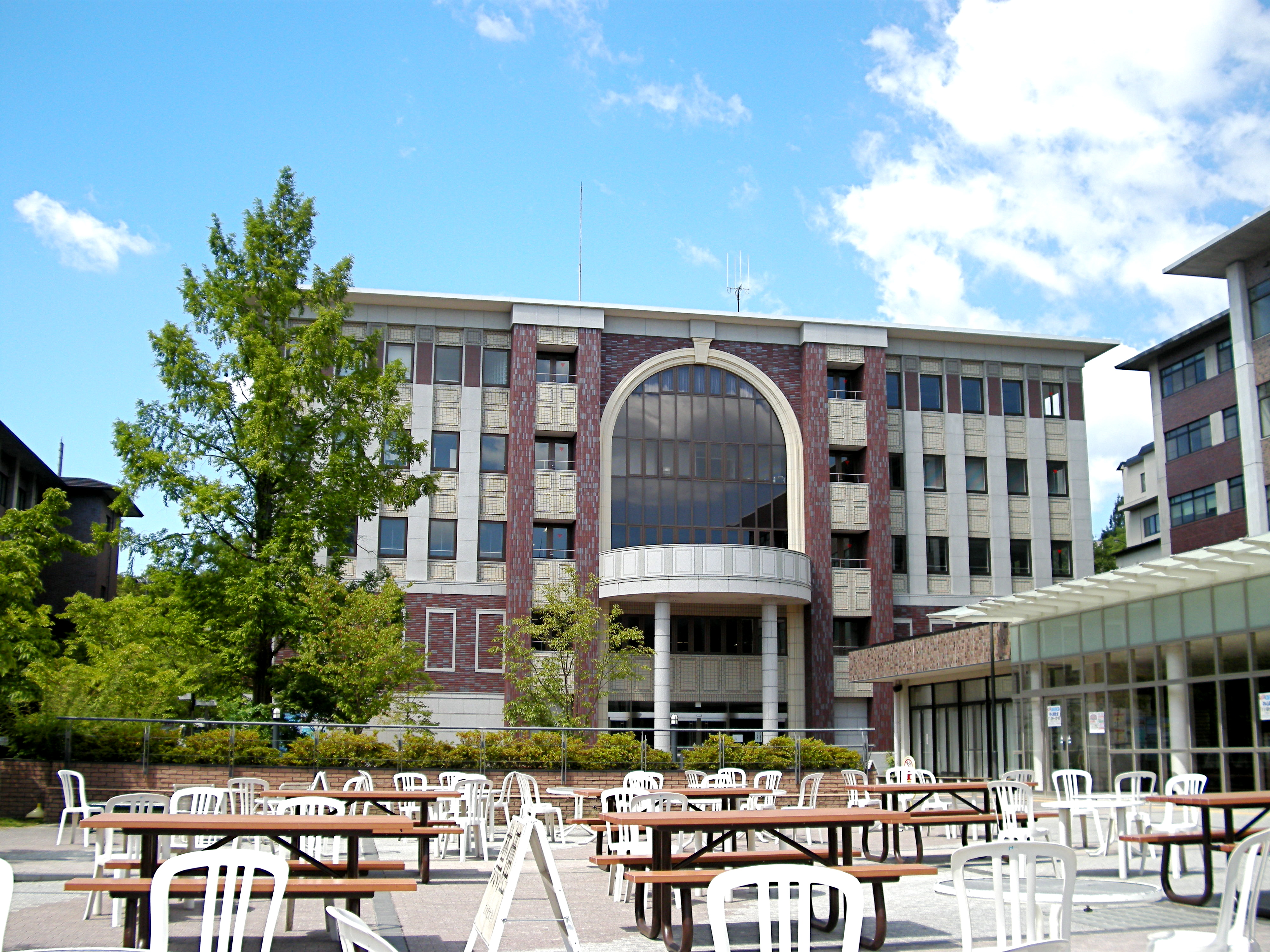 Ce bâtiment est utilisé pour le collège de relatoins international (Kyoto, Japon)